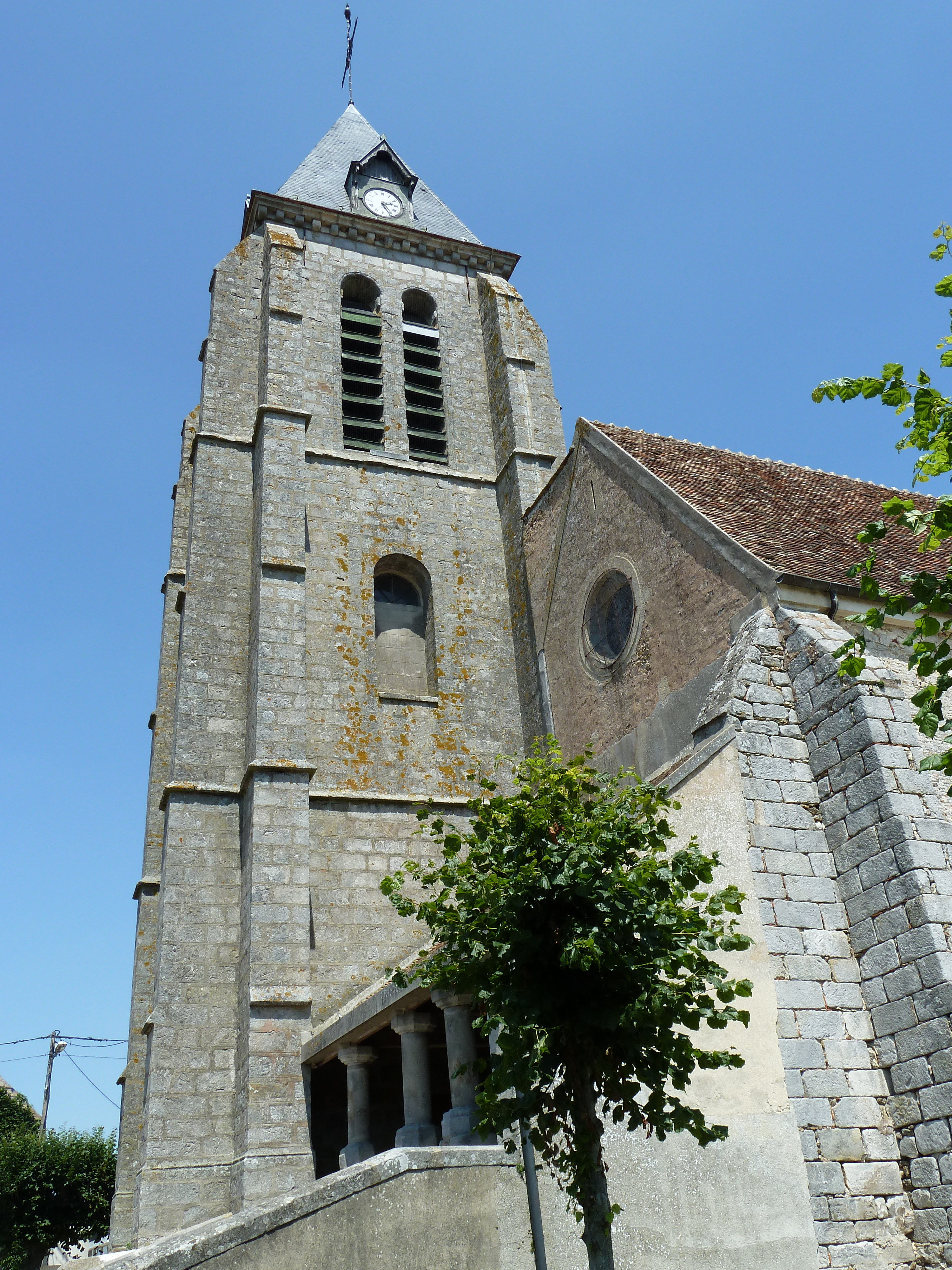 Le clocher du XVe siècle s'élève à 48 mètres